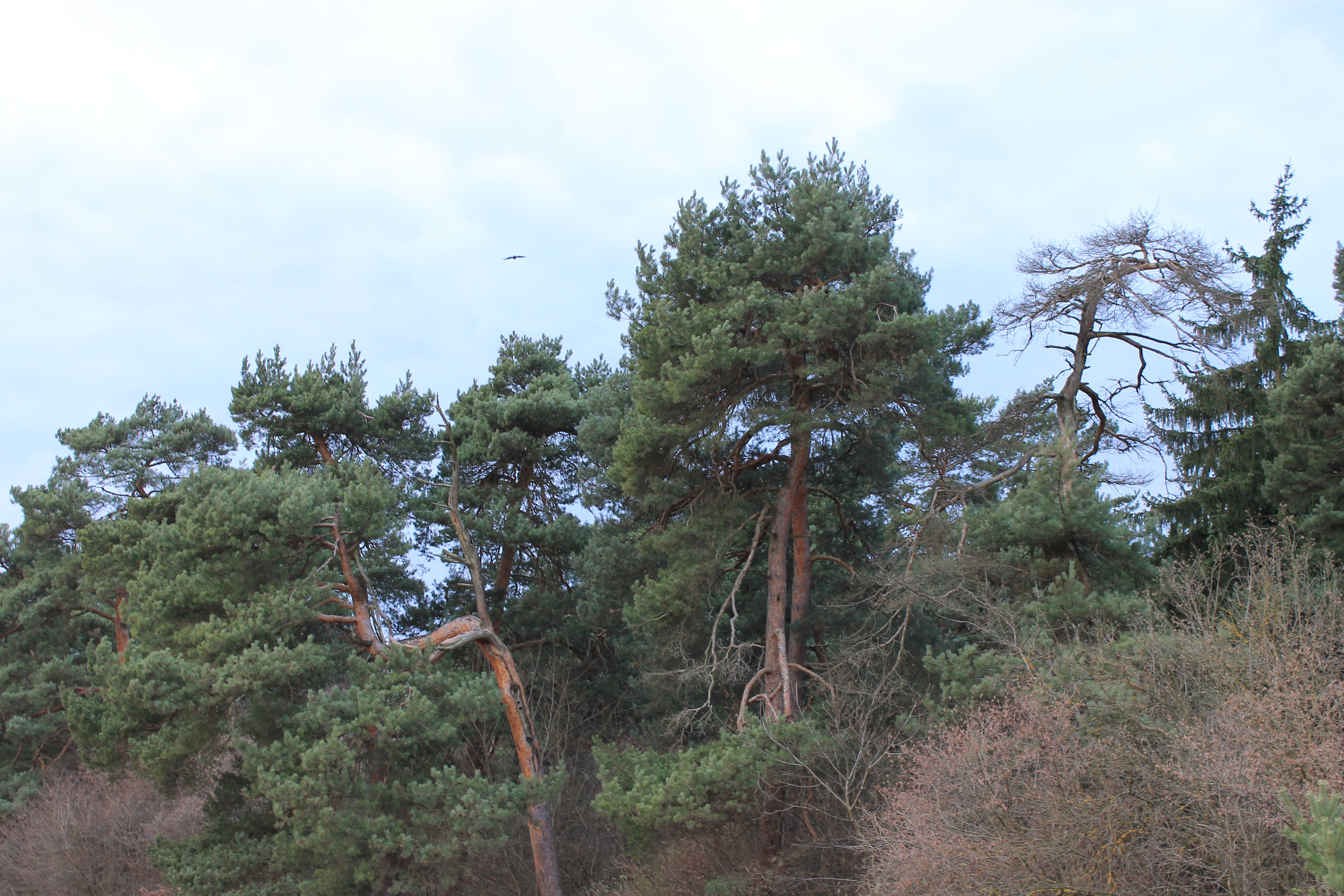 (NSG:BY-NSG-00611.01)_Panzerwiese und Hartelholz